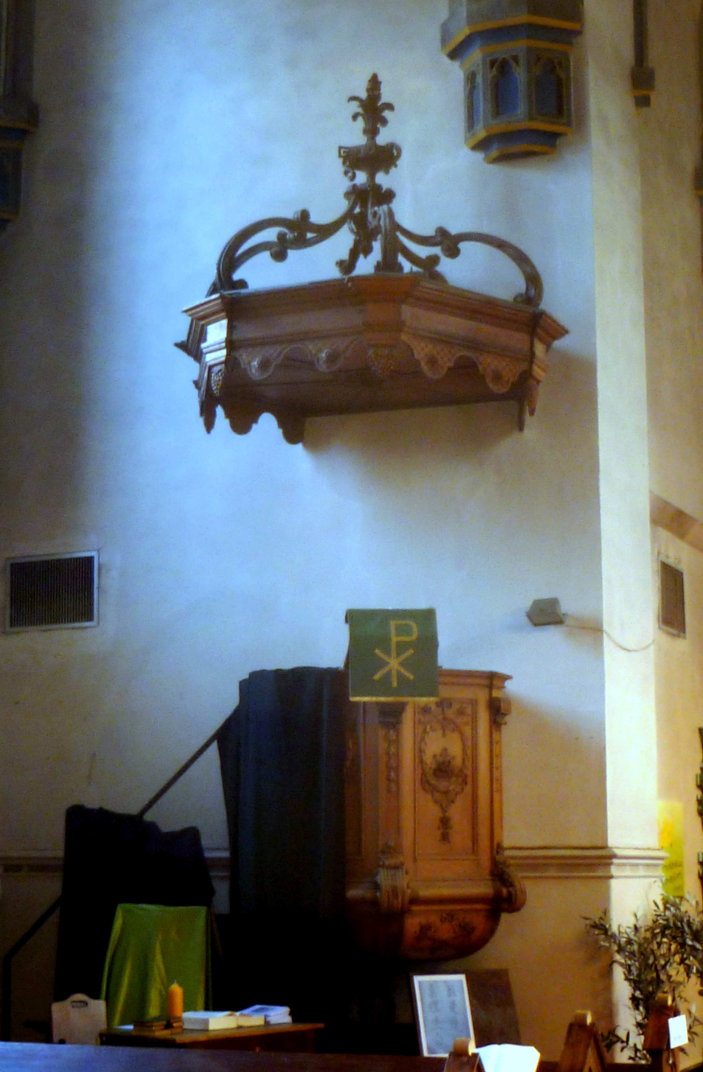 Kanzel der Friedenskirche in Eupen